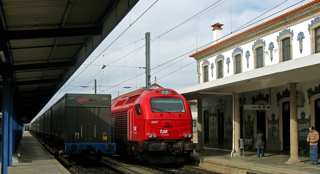 À esquerda: Serviço de transporte de Pasta de Papel Espartal - Alverca (prestes a sair) À direita: Locomotiva Vossloh 6007 da Takargo com o serviço especial de transporte de contentores (vazio) Entroncamento - Vilar Formoso